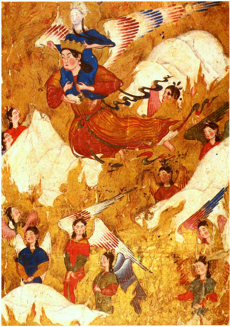 Ahmad Musa Архангел Джибраил несет пророка Мухаммеда